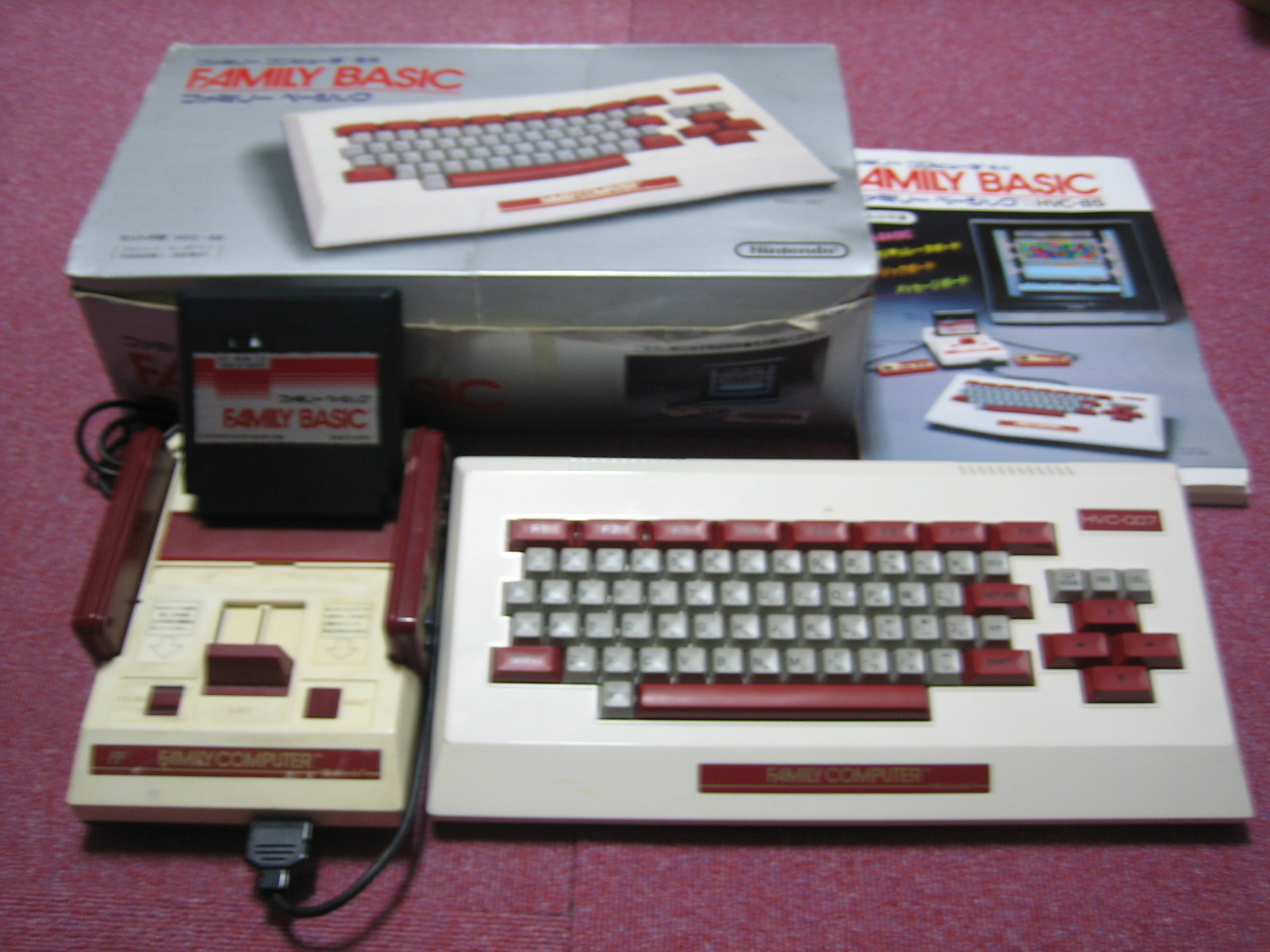 ファミリーベーシック